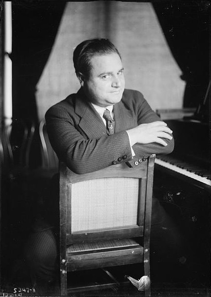 Beniamino Gigli (1890 - 1957), Italian singer, operatic tenor